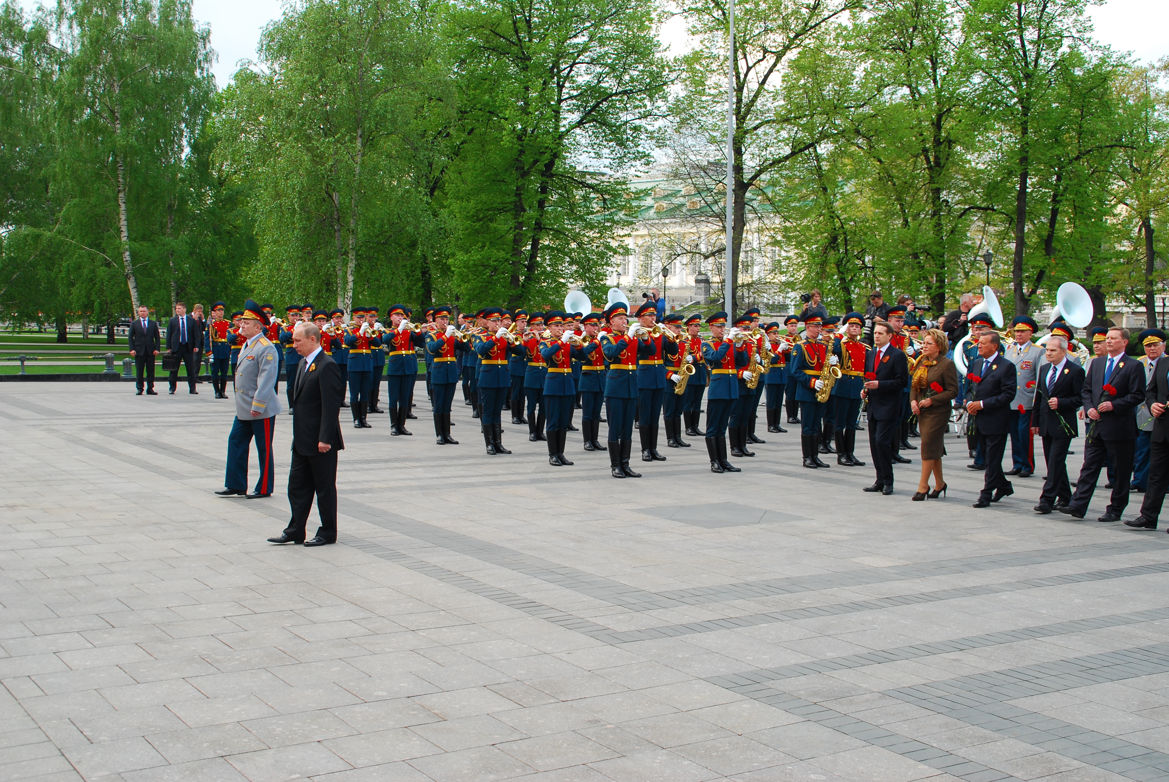 Возложение венка к Могиле Неизвестного Солдата Президентом РФ 8 мая 2012 г.